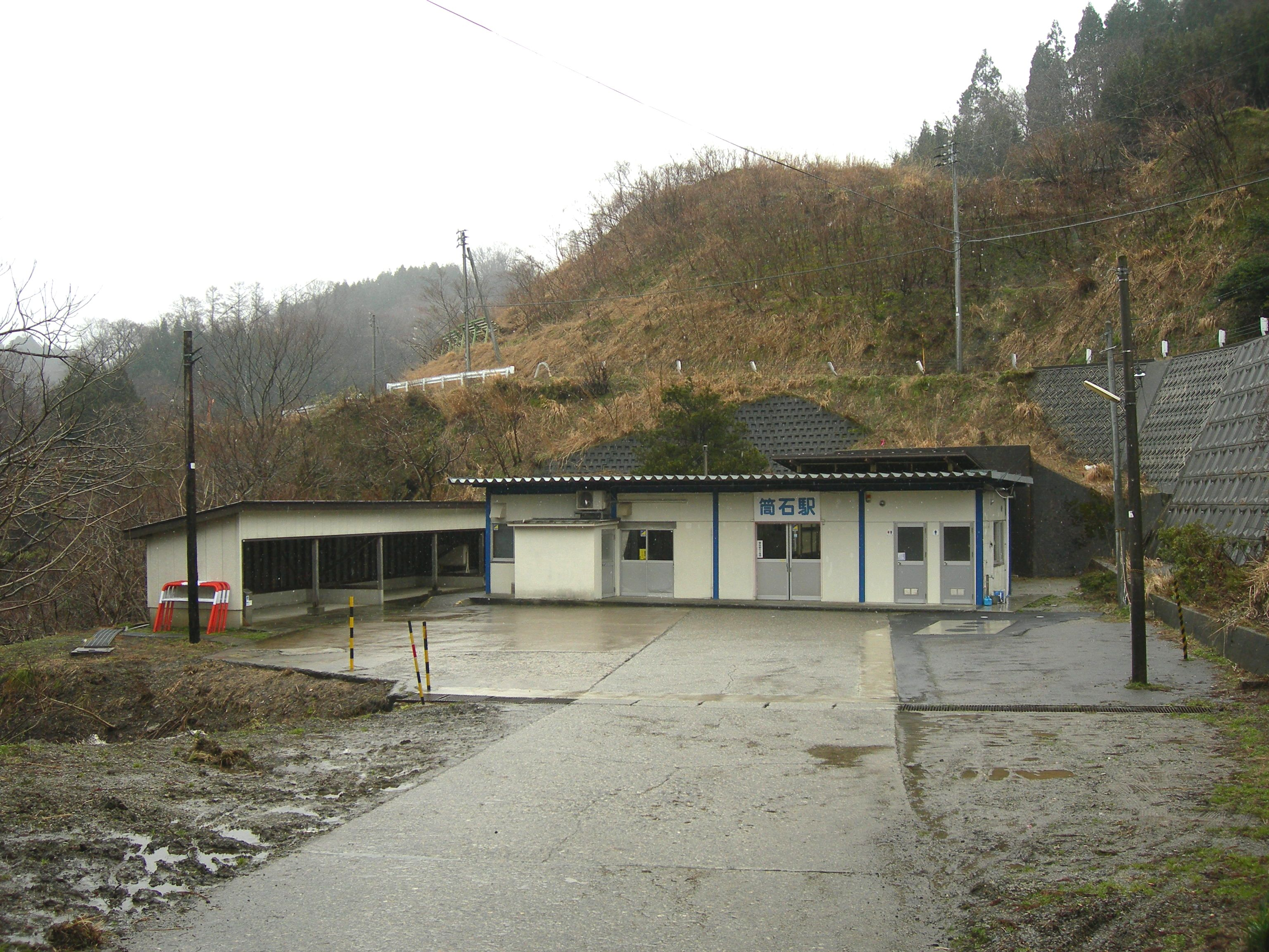 筒石駅